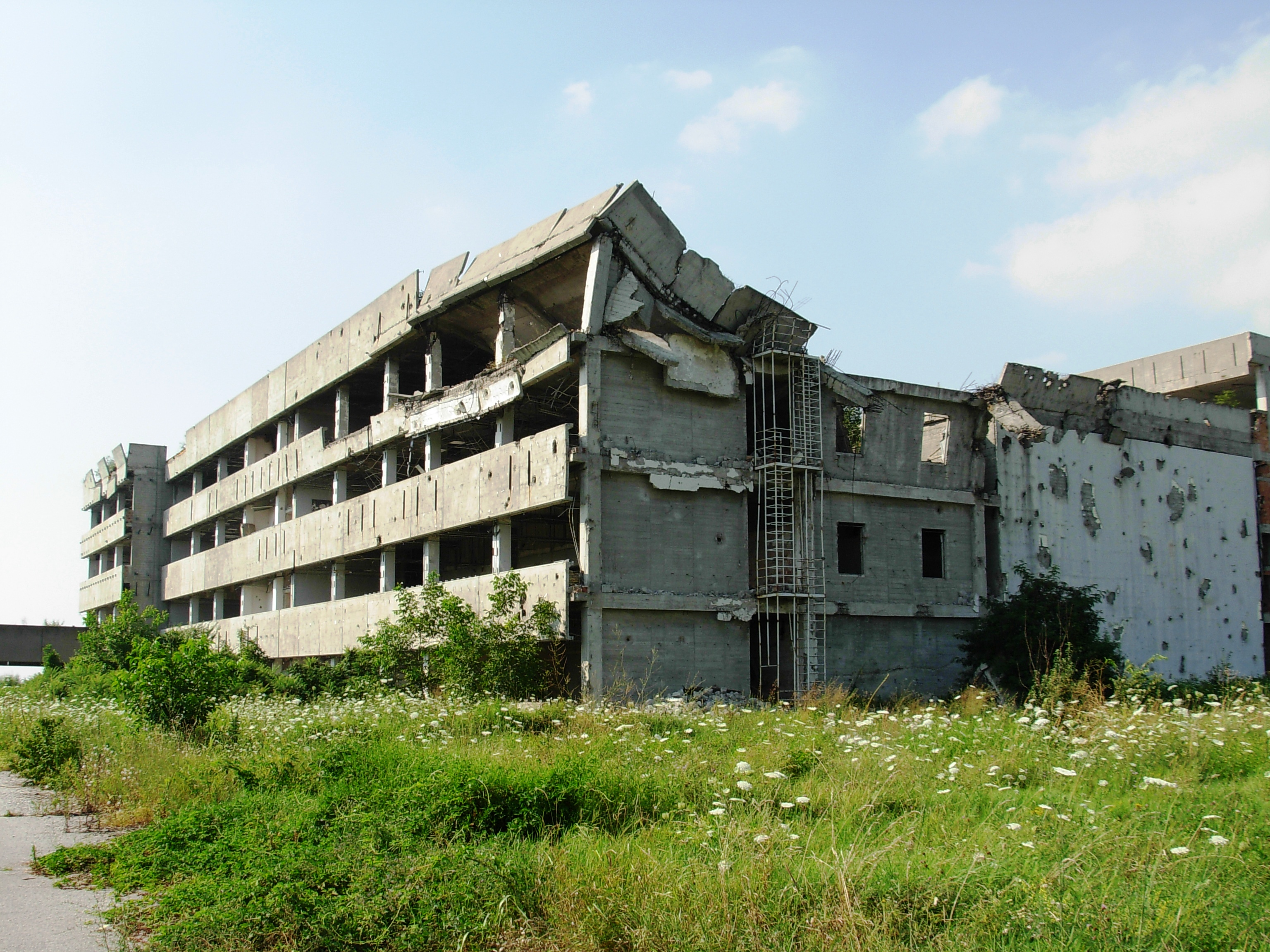 Budova rádia a televize Vojvodiny zničená během bombardování na jaře 1999. Snímek je pořízen ze zadní strany